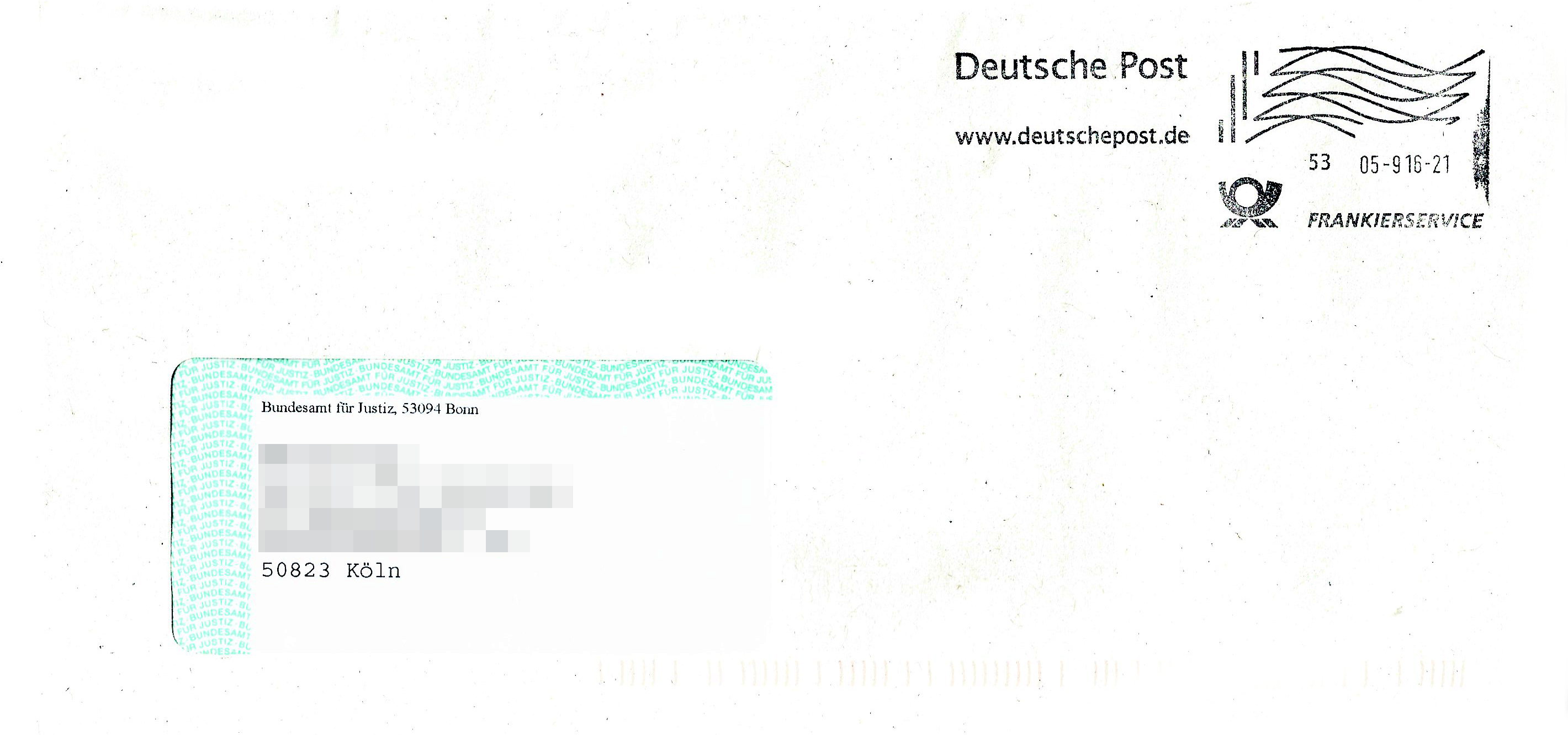 Briefumschlag Frankierservice Deutsche Post 2016. Absender: Bundesamt für Justiz, Bonn